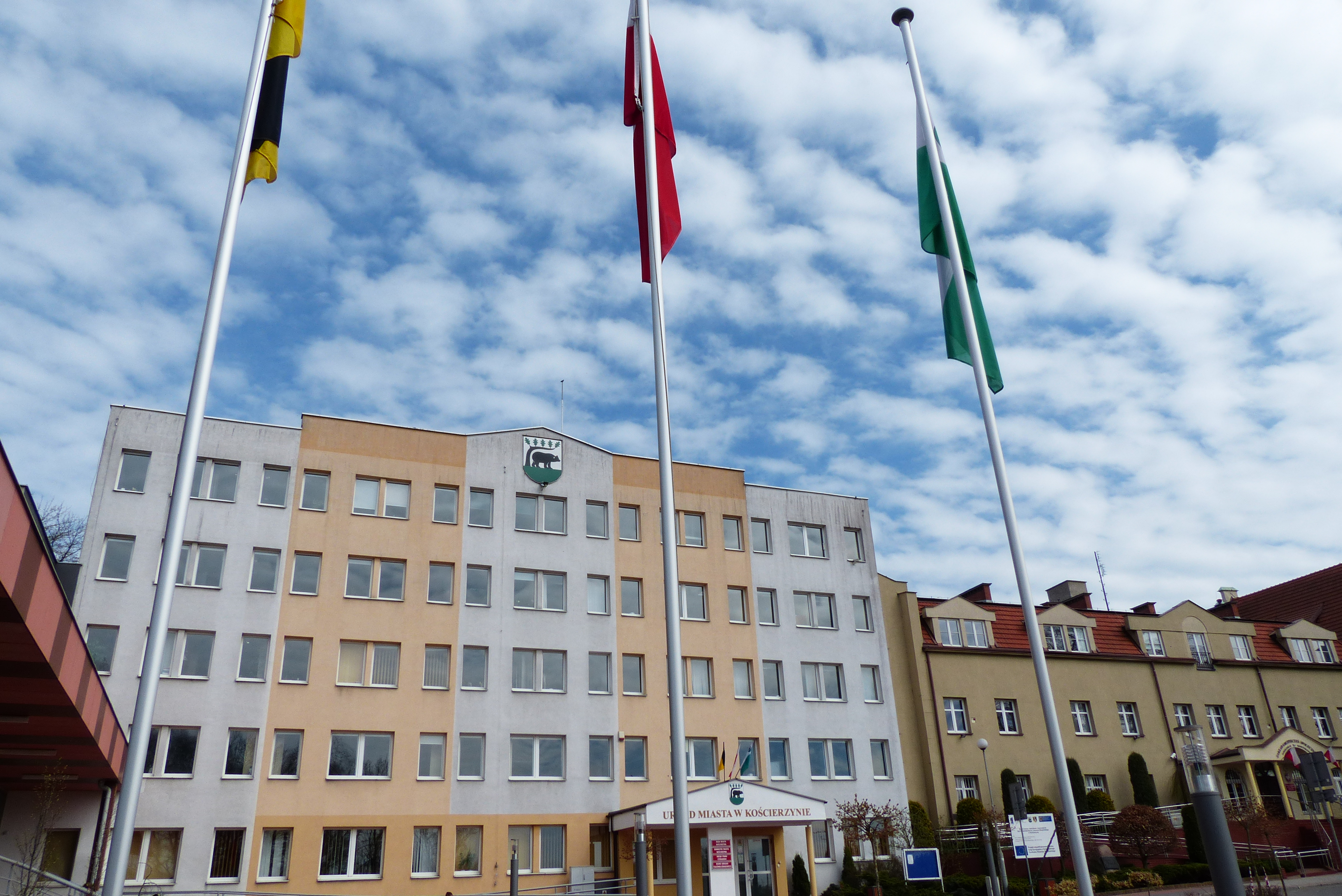 Koscierzyna, Poland